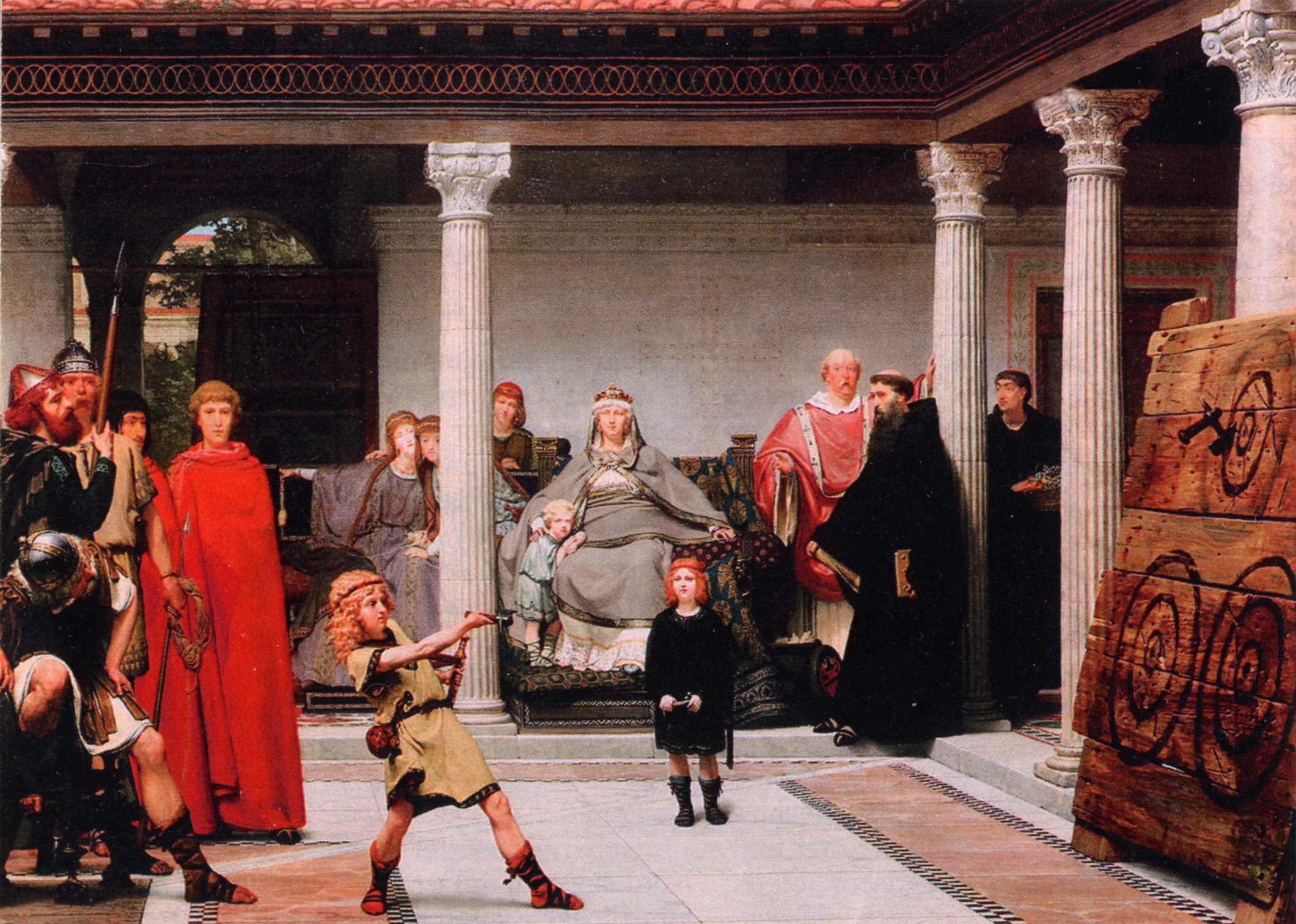 Chlodwig-Söhne bei Wurfübung